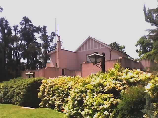 Quinta Municipal La Colonial, Merlo.